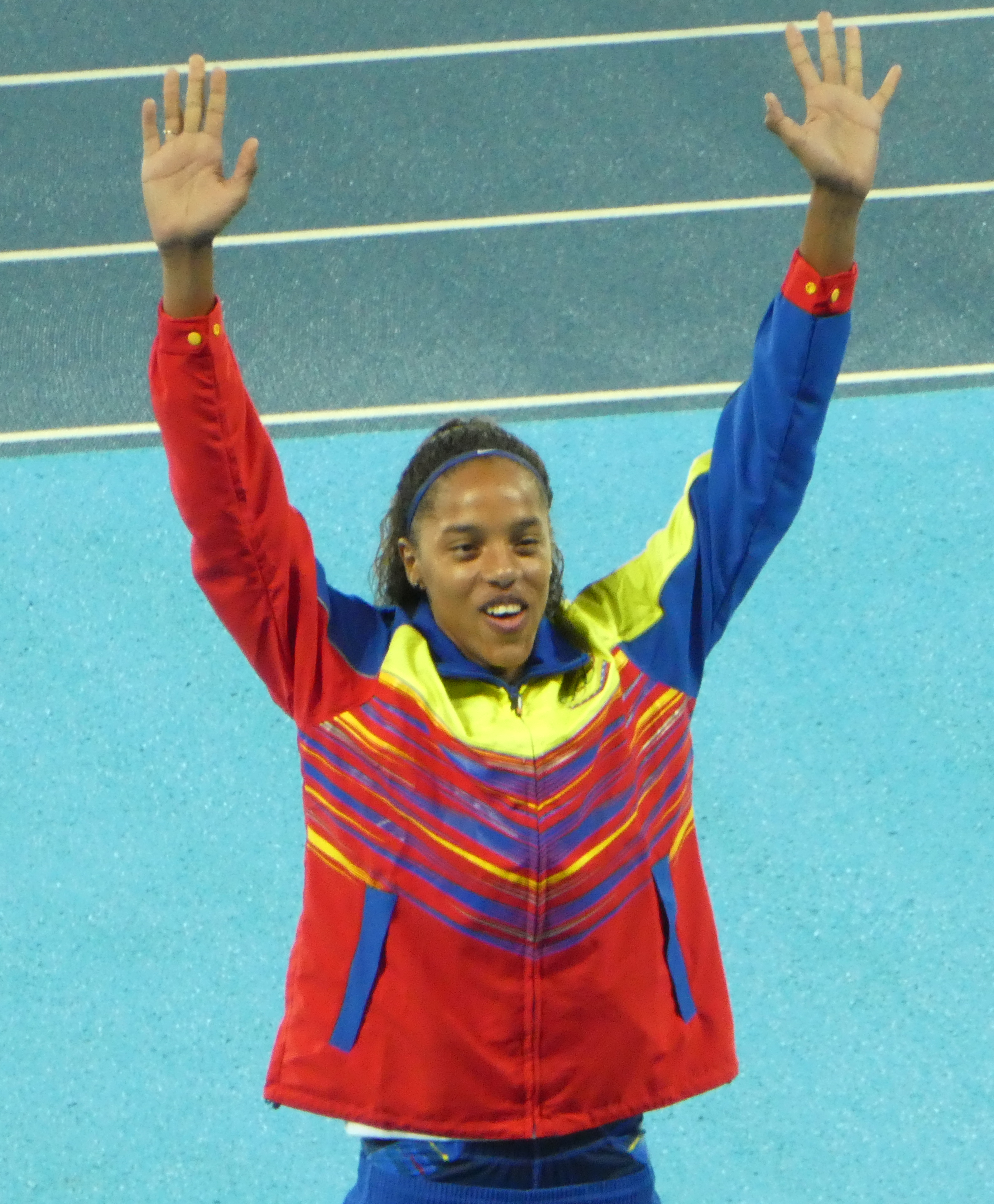 Stade Olympique, session d'athlétisme. Podium du triple saut féminin, médaille d'argent Yulimar Rojas